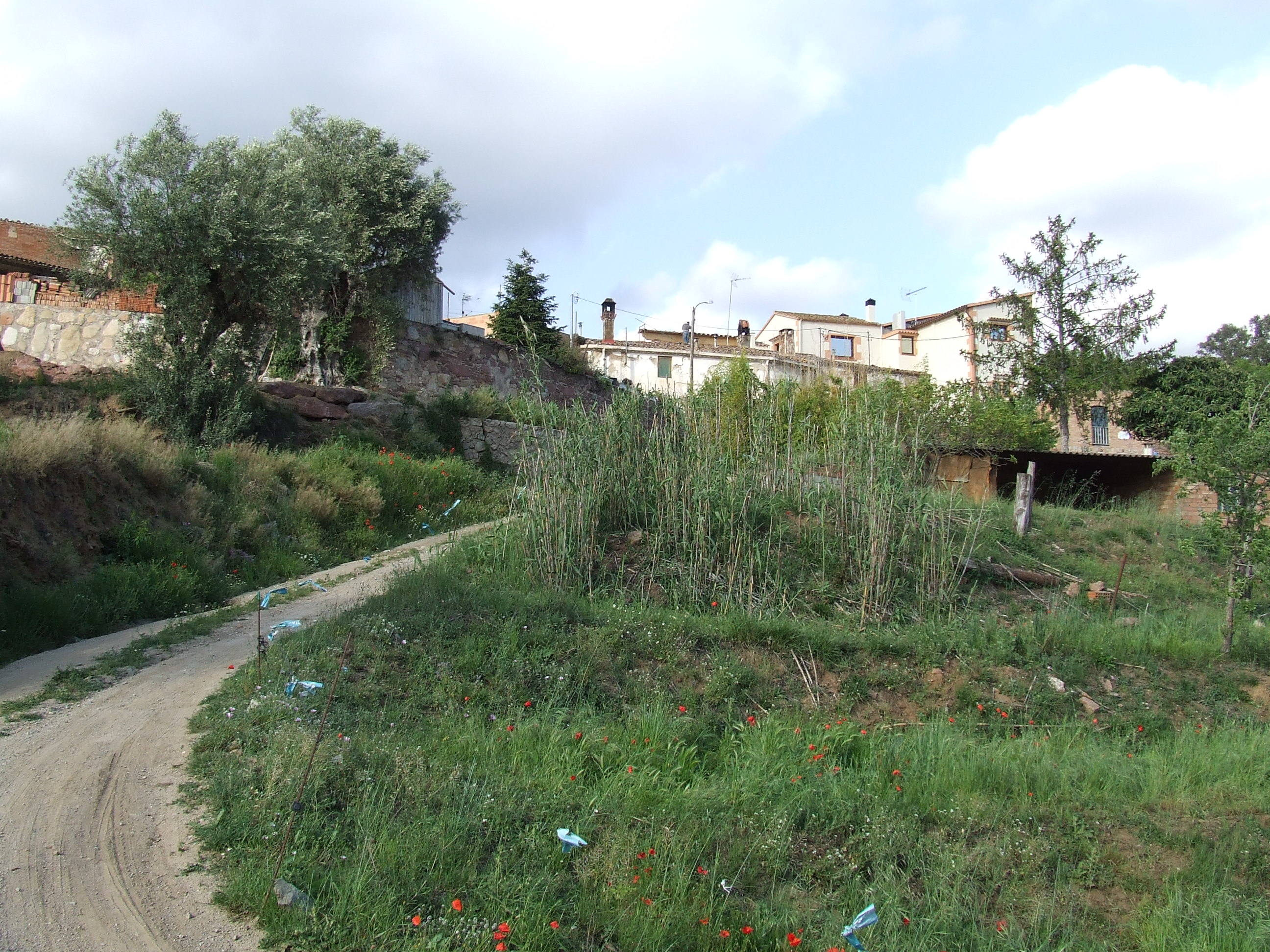 El Veïnat (Bigues, Bigues i Riells, Vallès Oriental)